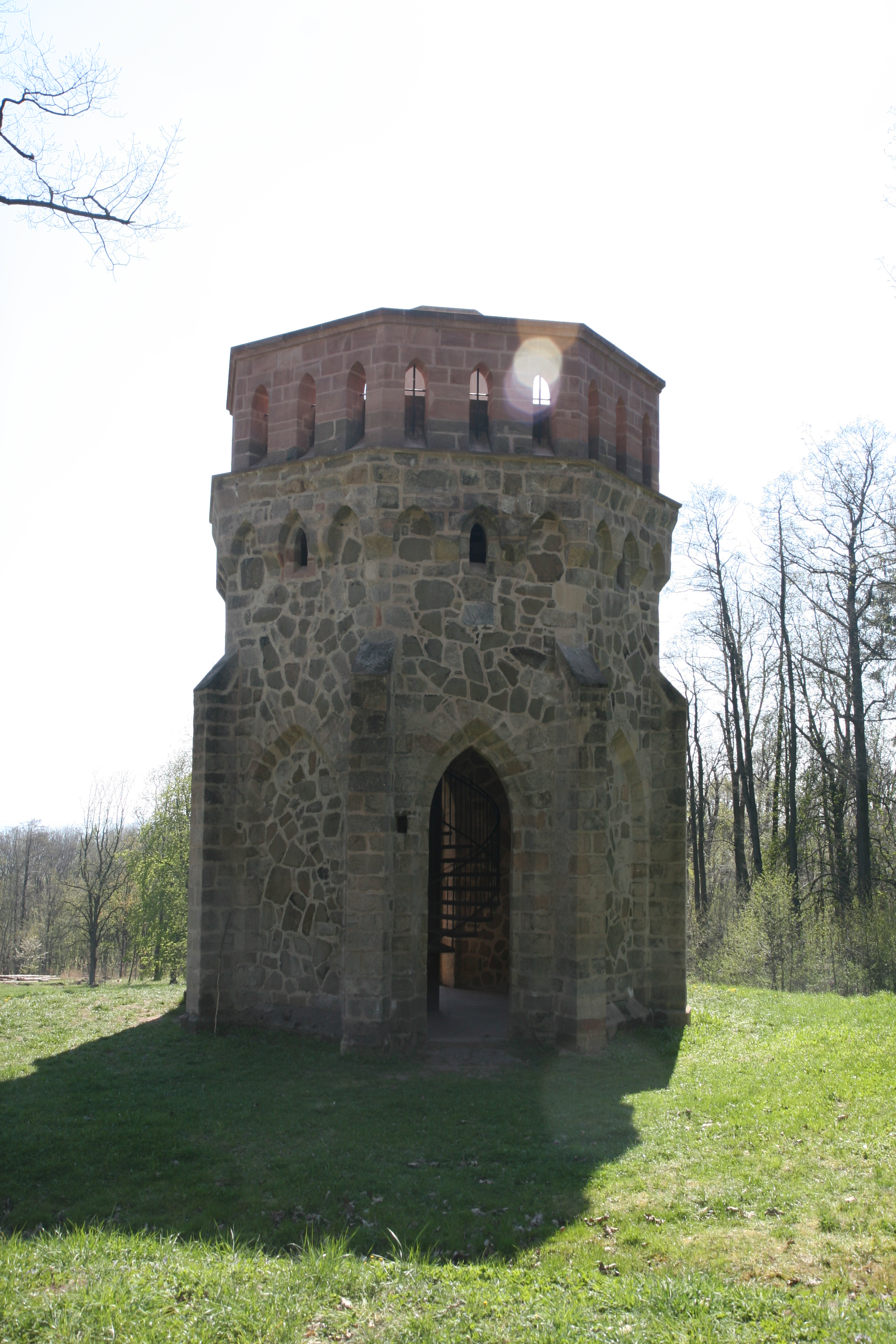 Pohled